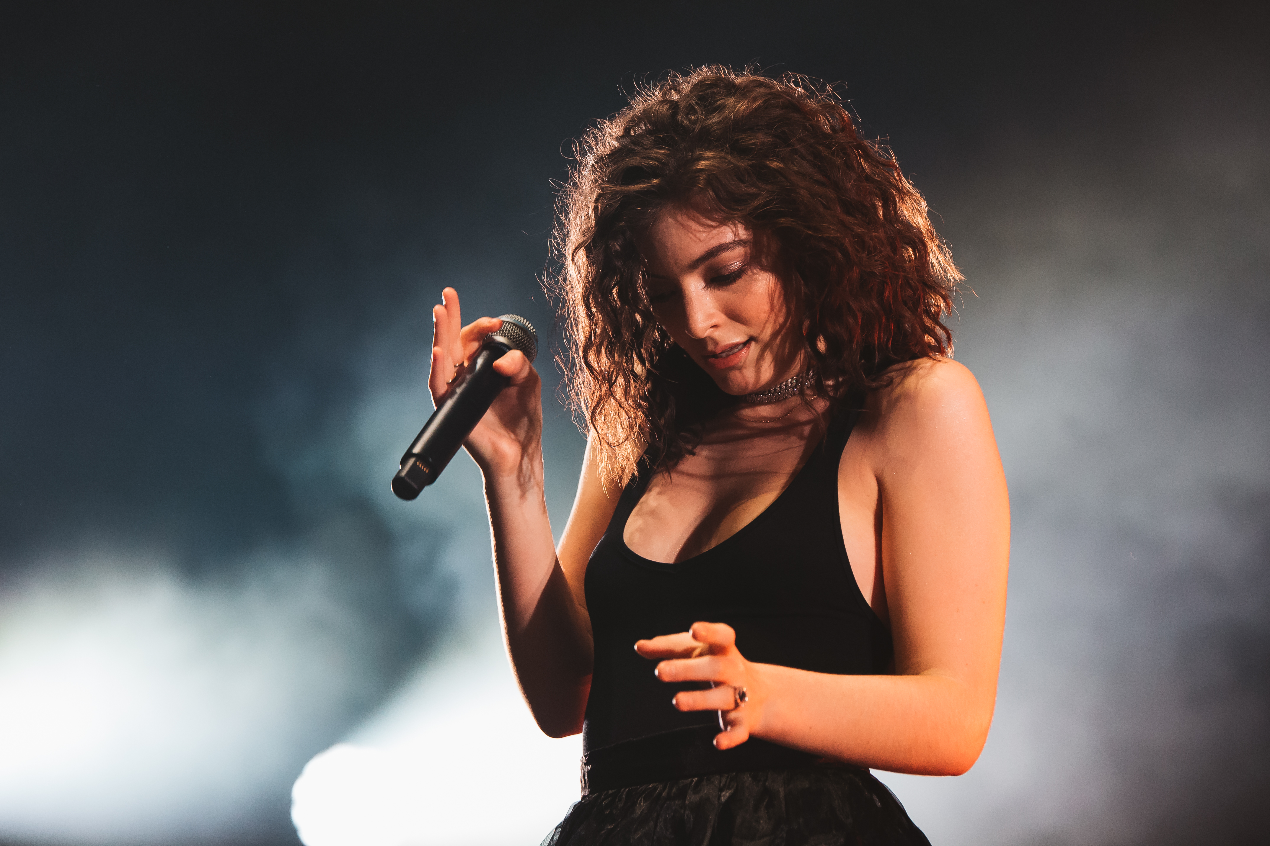 Photo: Krists Luhaers // @Kristsll